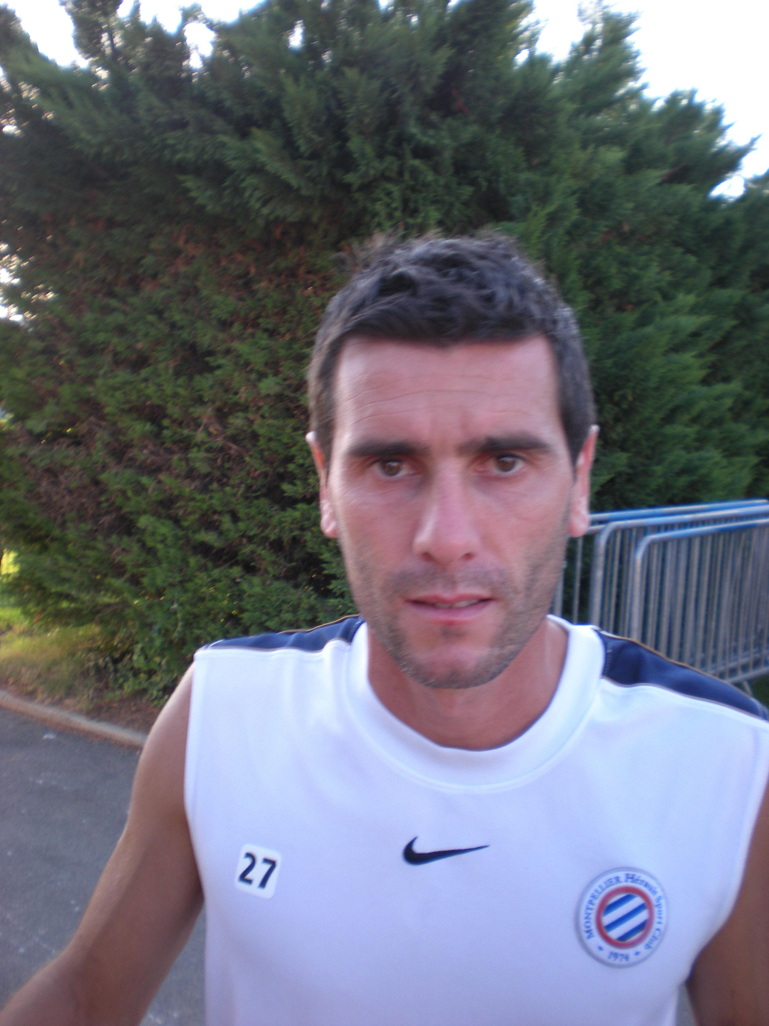 Cyril JEUNECHAMP.